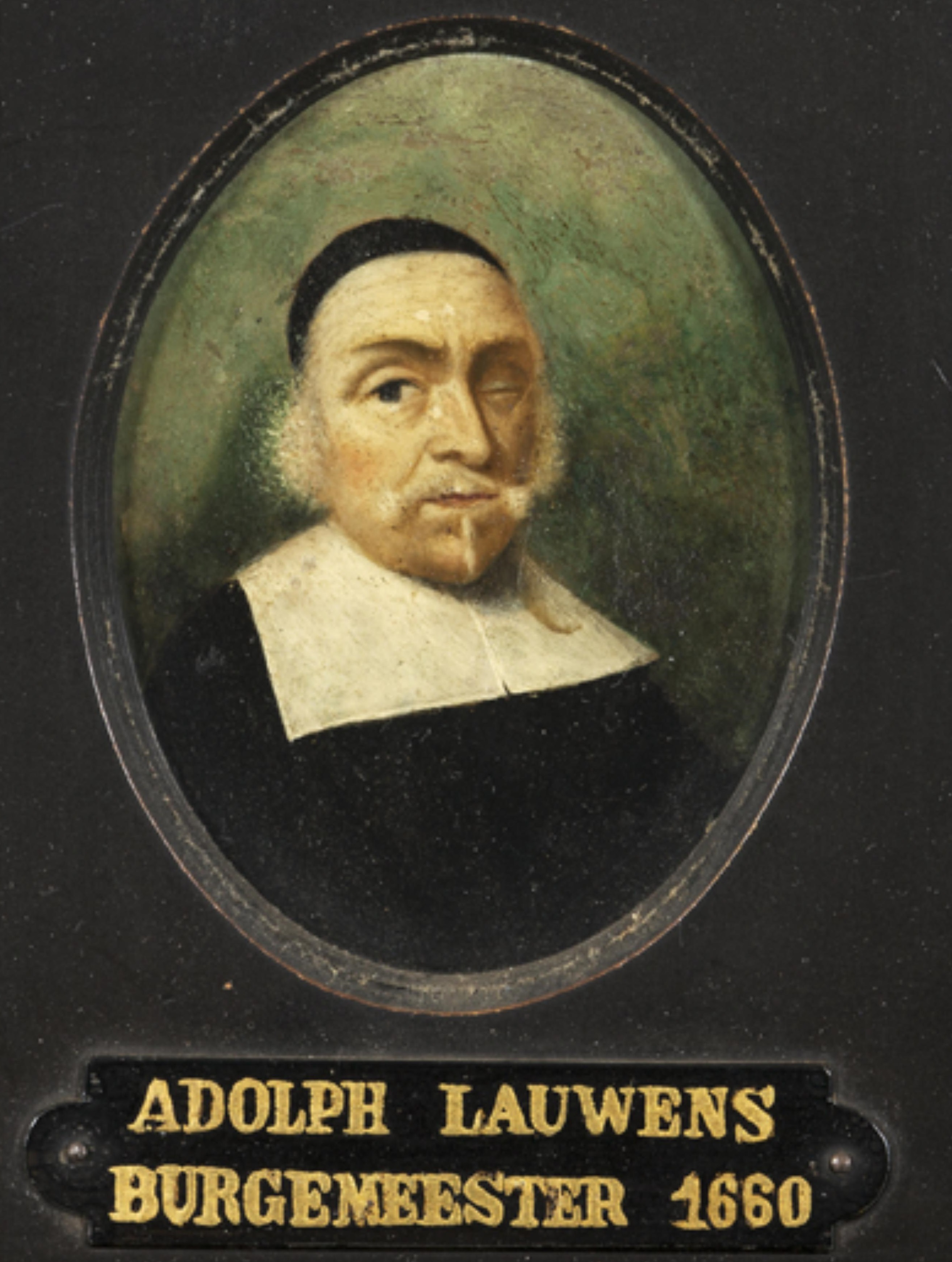 Portret van burgemeester Adolph Louwens van Groningen